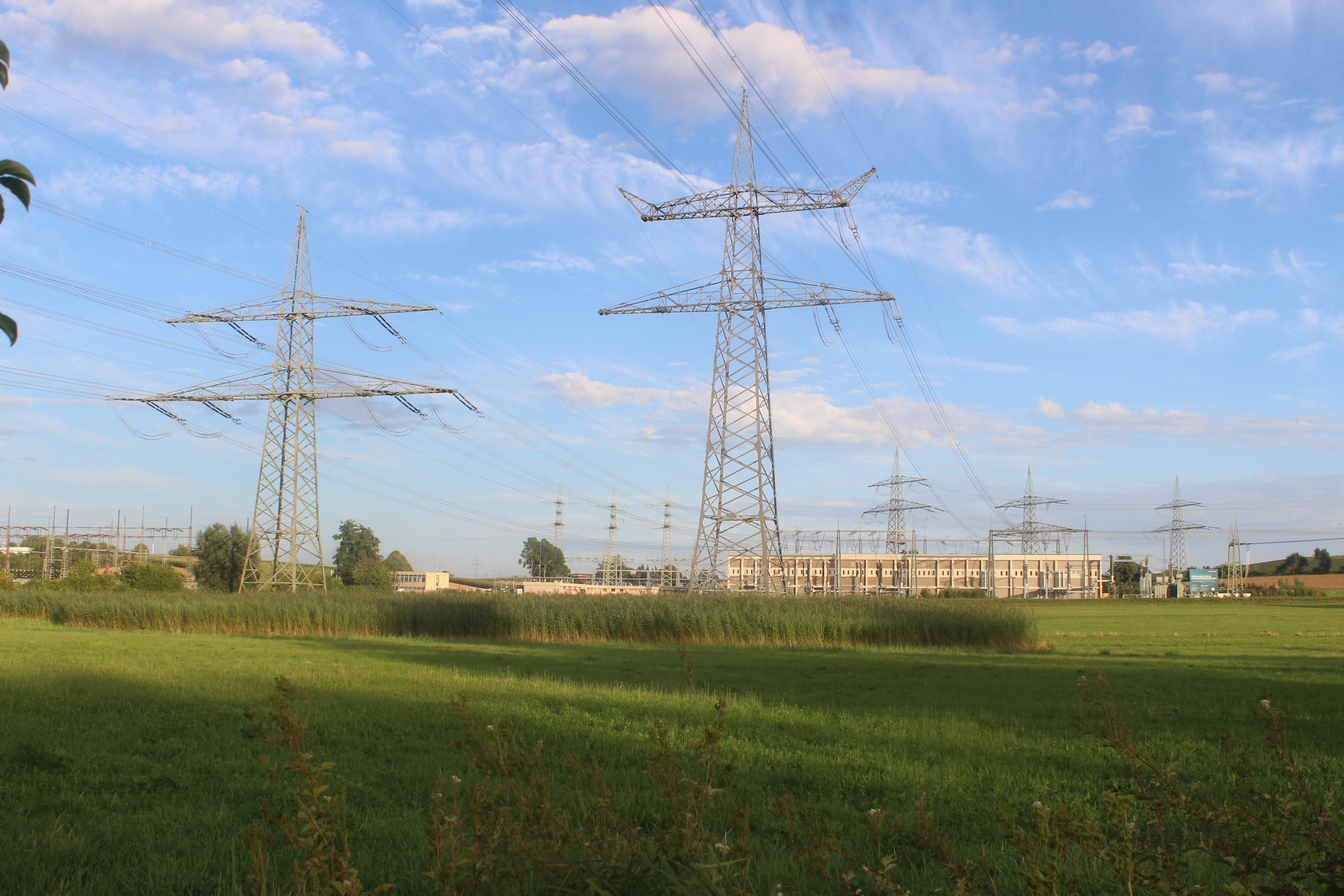 Zwei 380 kV-Leitungen verlassen das EnBW-Umspannwerk Großgartach in nördliche Richtung